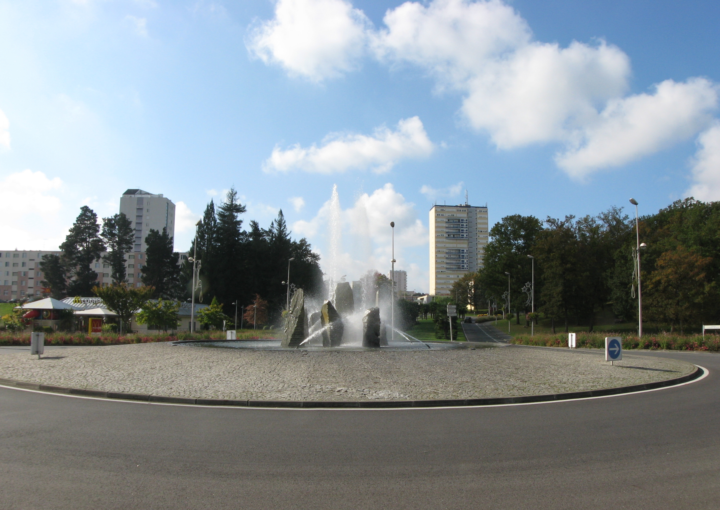 Entrée de Mourenx depuis la route de Pau (Pyrénées-Atlantiques) Pyrénées).